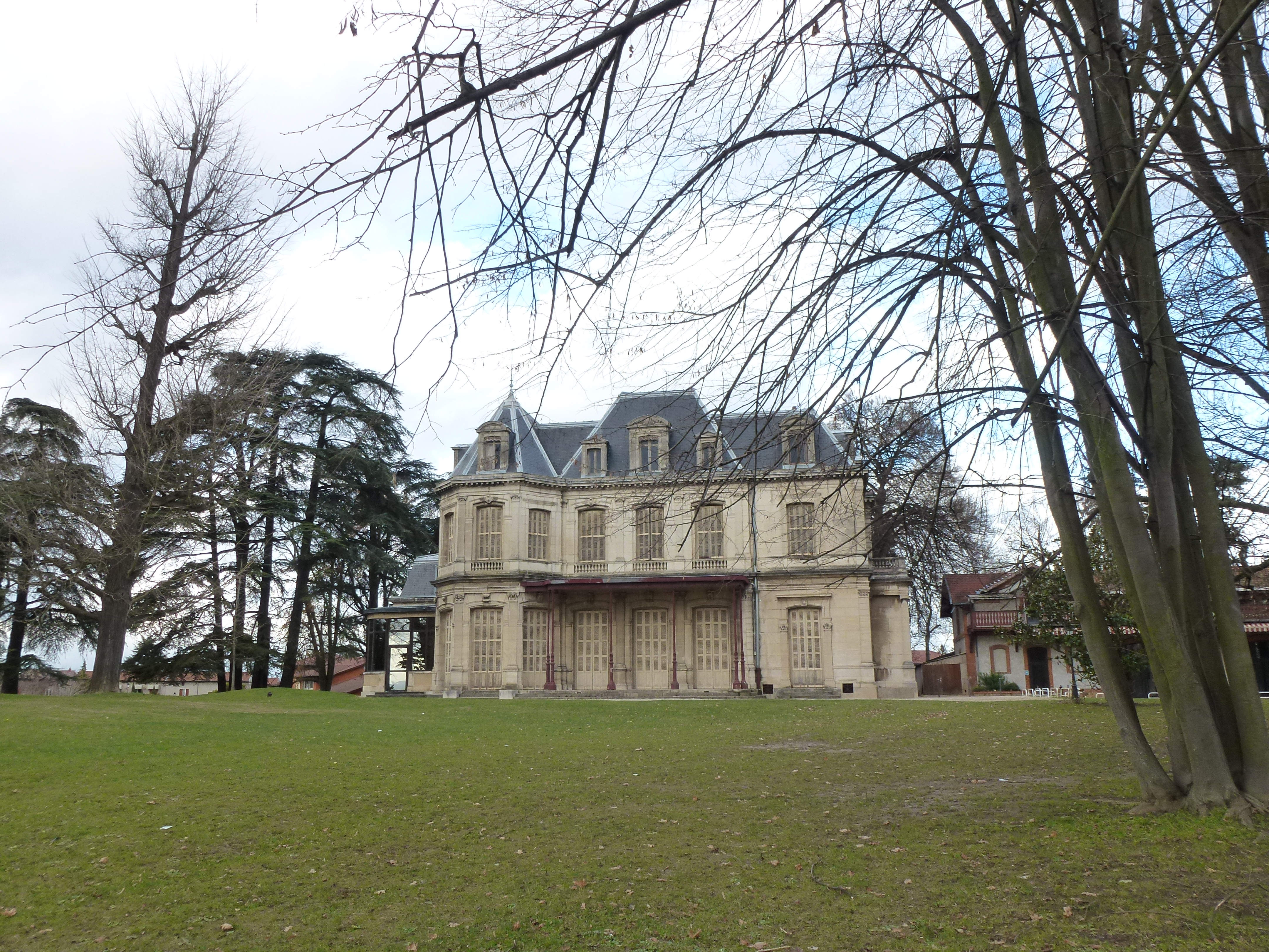 Château de Bernis à Sathonay-Village dans le Rhône.